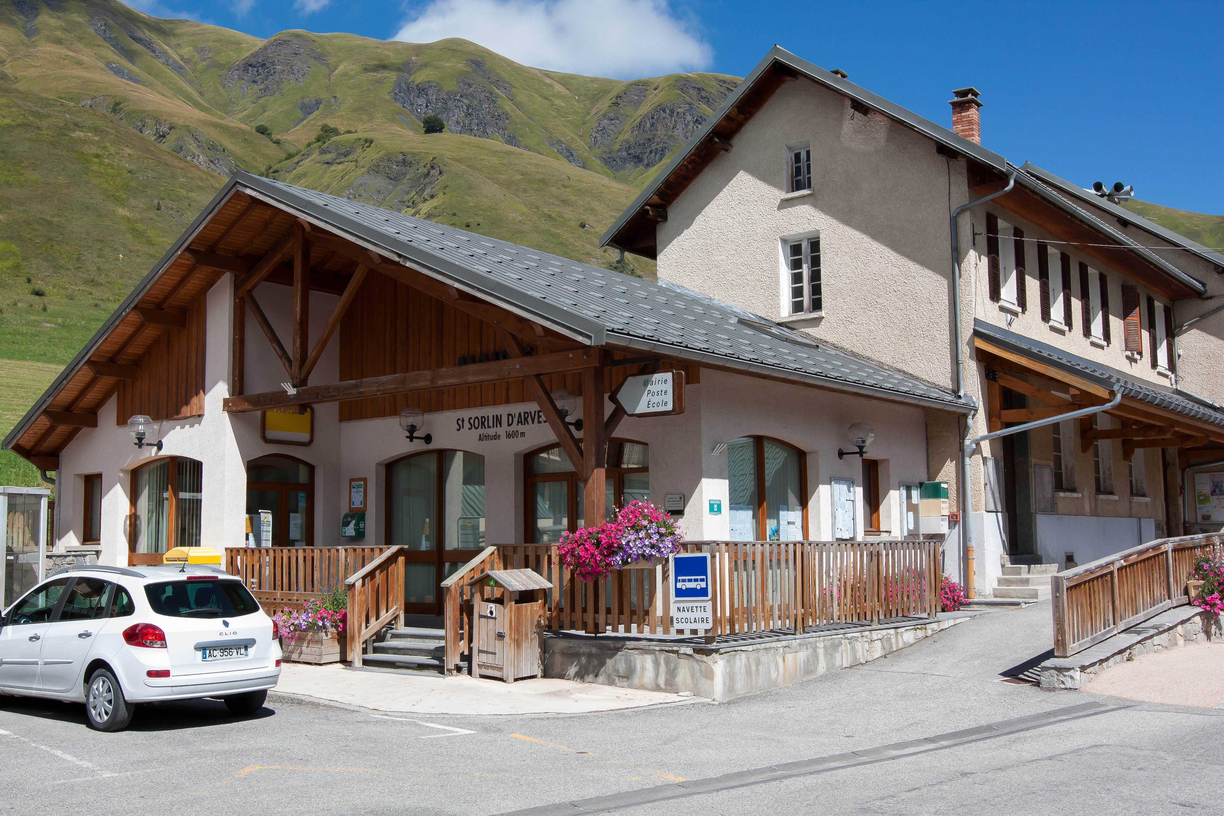 Hôtel de ville de Saint-Sorlin d'Arves / Saint-Sorlin-d'Arves / Savoie / France